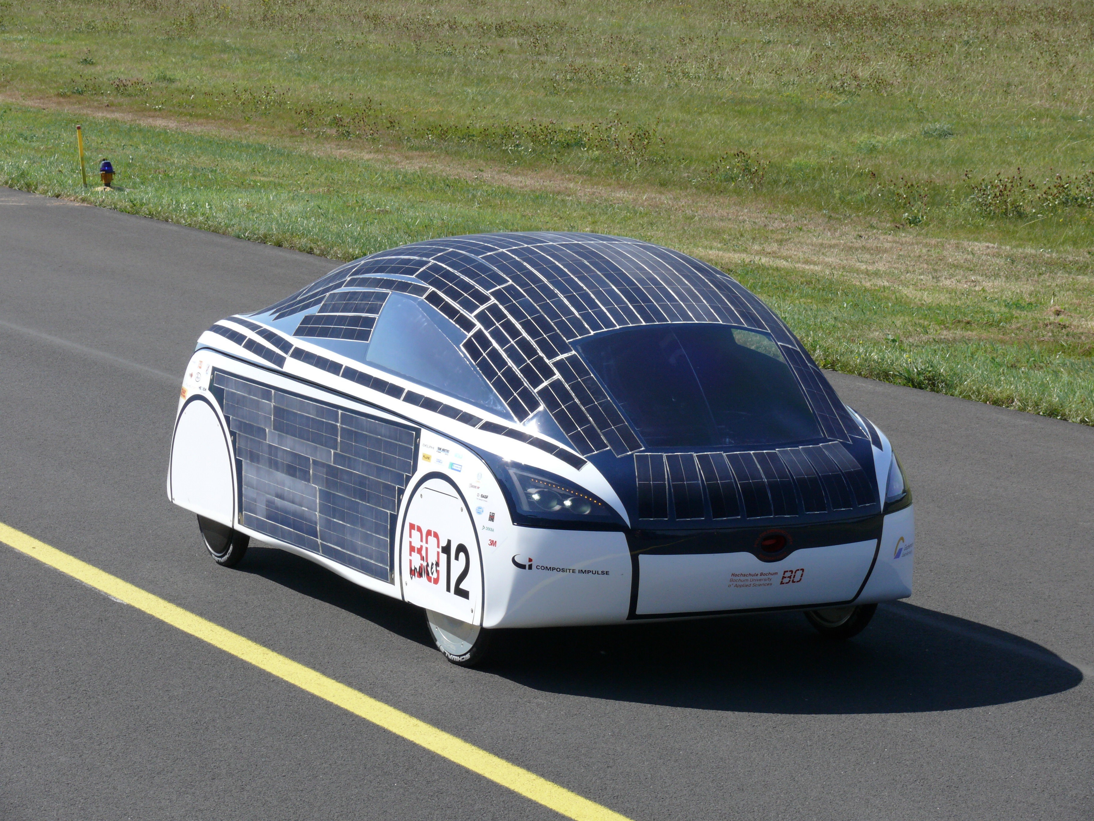 BOcruiser, ein Solarfahrzeug der Hochschule Bochum (2009)